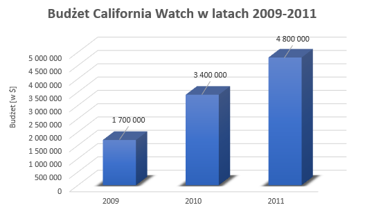 Budżet California Watch w latach 2009-2011